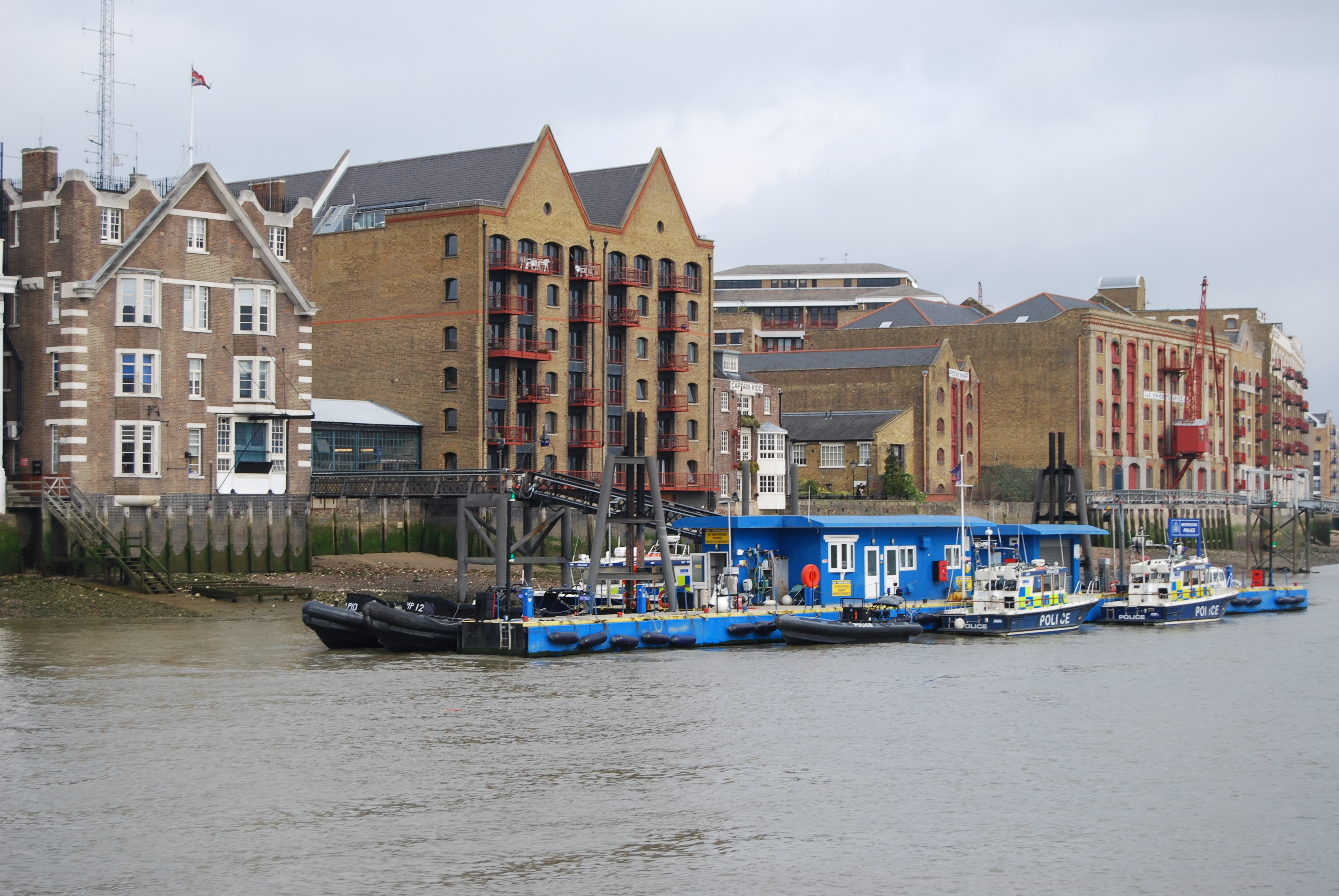 London